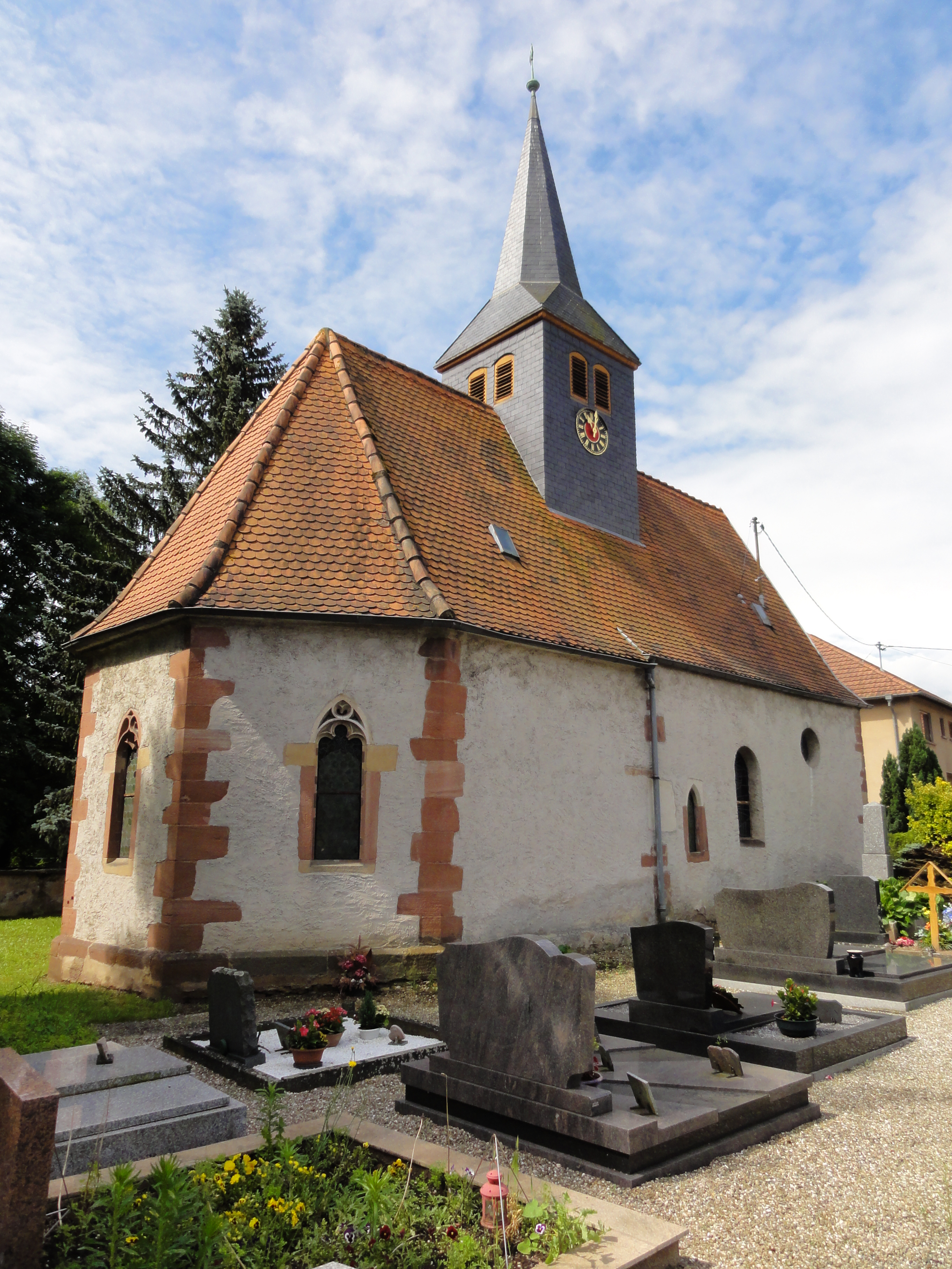 Alsace, Bas-Rhin, Krautwiller, Église protestante (XIIIe-XVe-XVIe), rue du Temple.